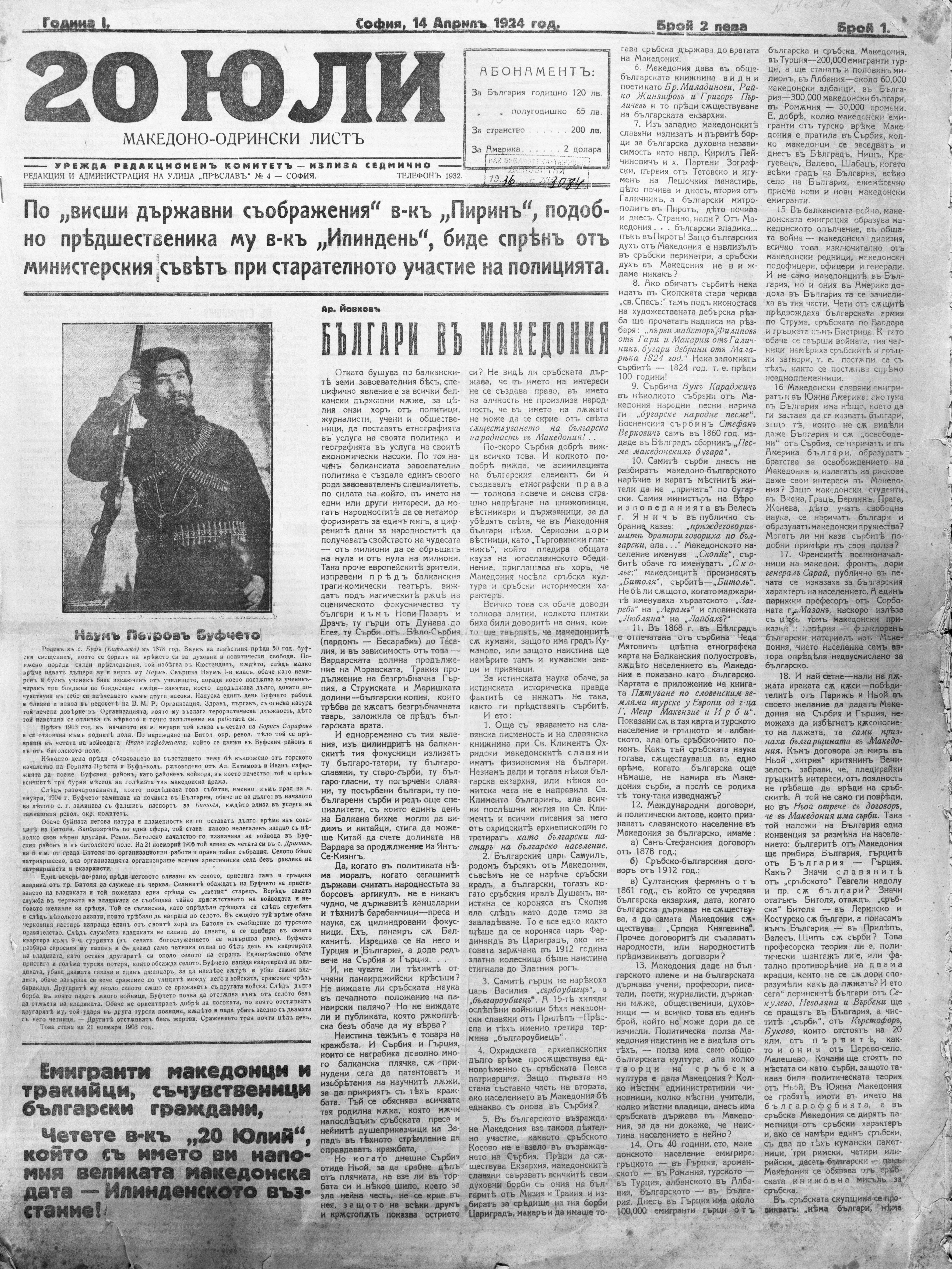 Статията на Арсени Йовков от с. Селци, Стружко, Вардарска Македония - "Българи в Македония", публикувана във в-к "20 юли. Македоно - Одрински лист", год. I, бр. 1, София, 14 април 1924 година